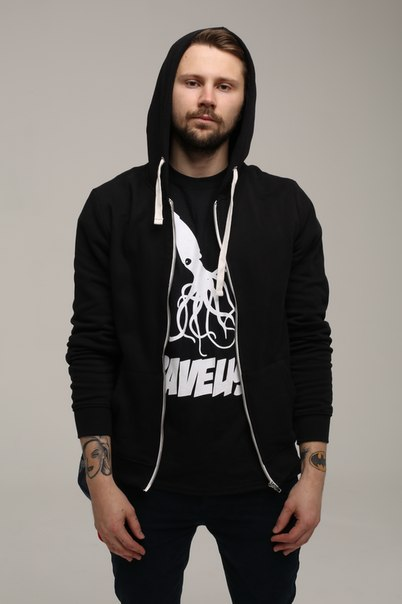 Закржевский Александр, бас-гитарист группы Дай дарогу! (Брест, Беларусь)